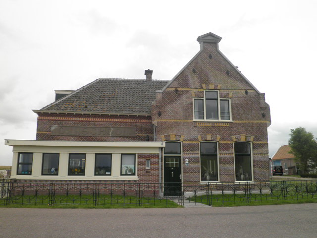 Etersheim 8a in Oosthuizen, voormalige openbare lagere school van Etersheim. Sinds 2013 is hier het Dik Trom kinderboekenmuseum in gevestigd.